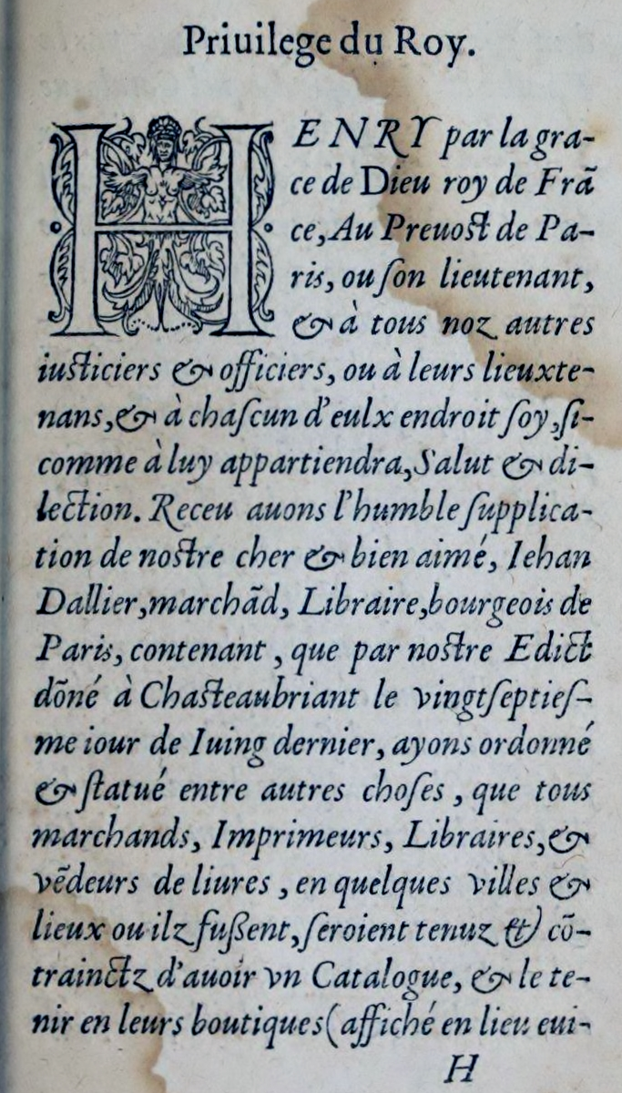 Privilège extrait du « Catalogue des livres examinez et censurez par la faculté de théologie de l'université de Paris, depuis l'an mil cinq cens quarante et quatre jusques à l'an mil cinq cens cinquante et un... auquel sont adjoustez ceulx qui ont esté visitez et censurez depuis la première impression », édité en 1556 par J. Dallier